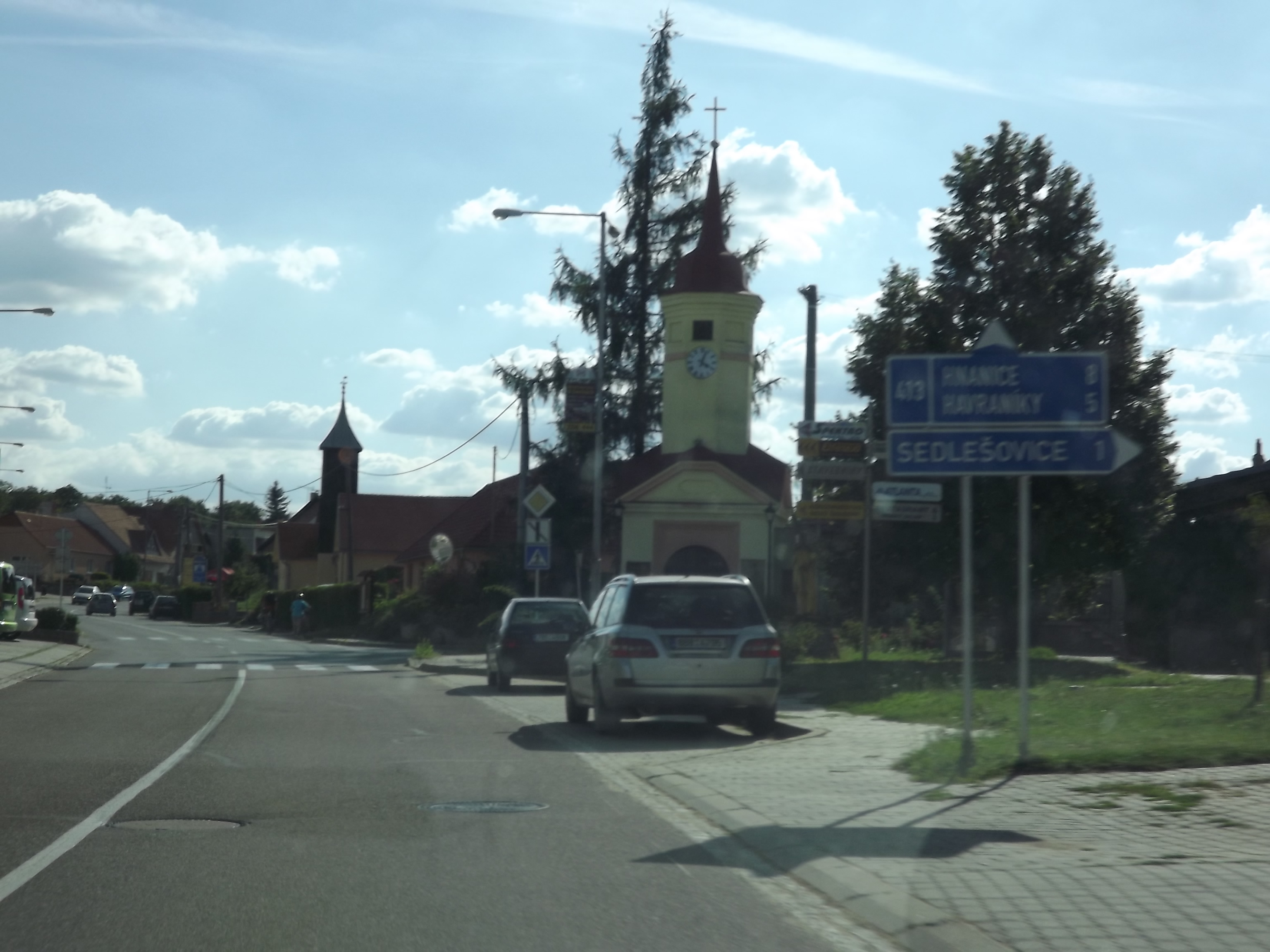 kaple